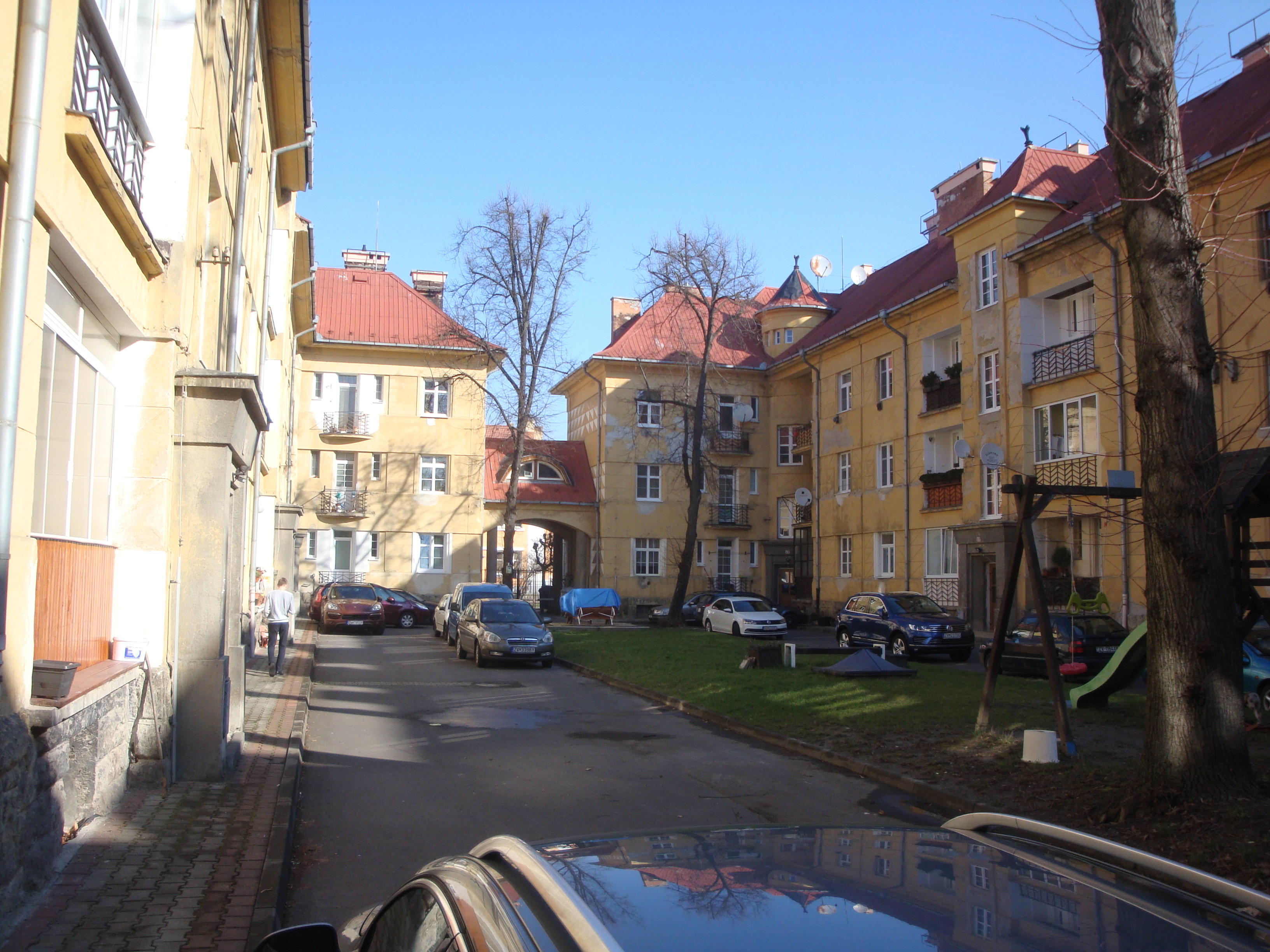 Pohľad do dvora